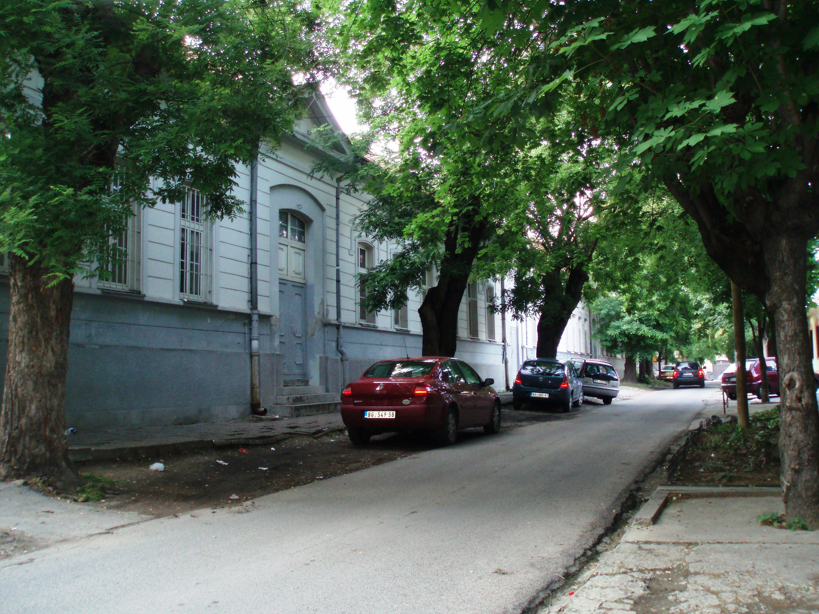 Srpska škola u Gornjoj varoši u Zemunu, autor fotografije: Nicolo